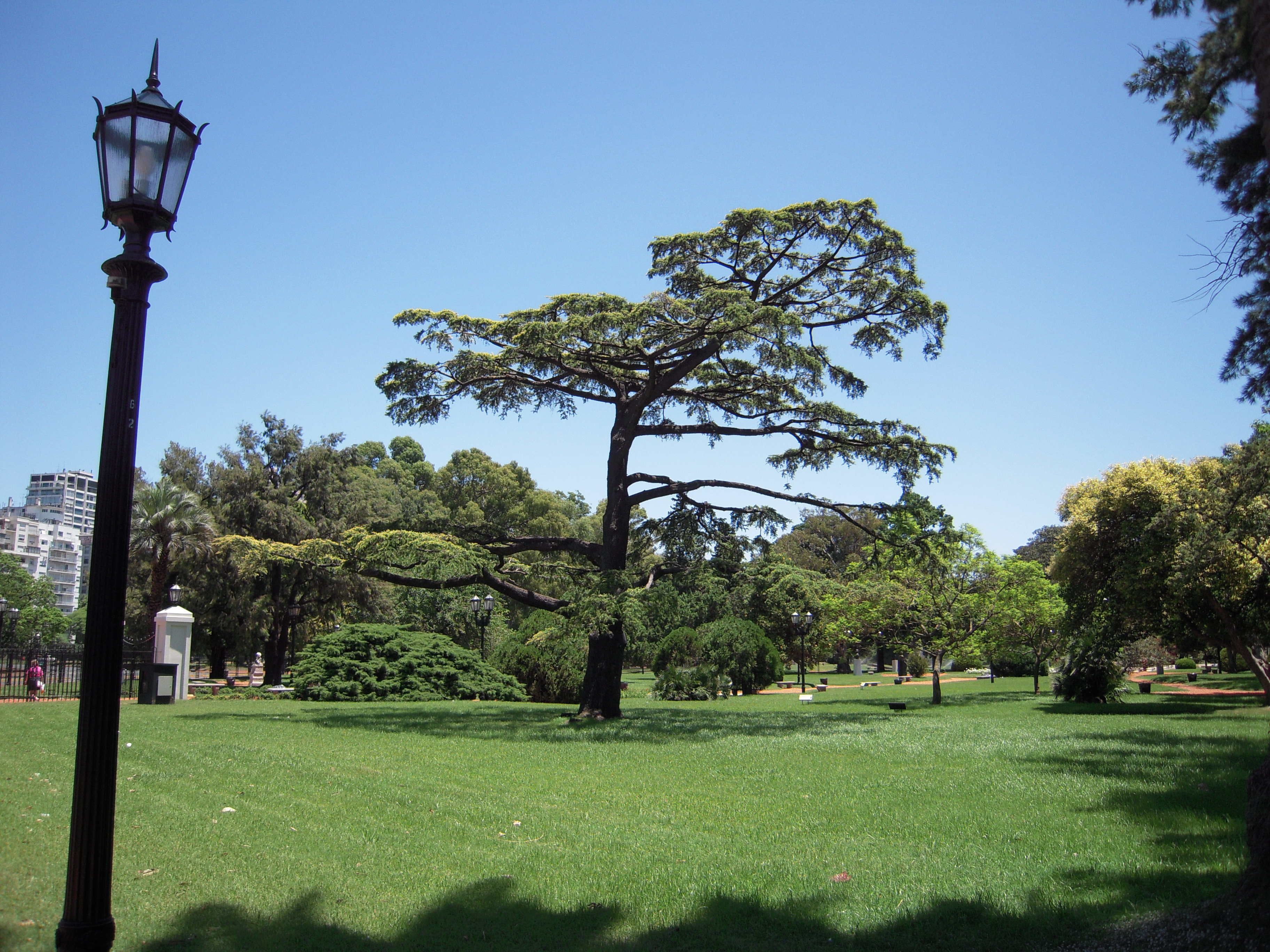 Parque 3 de Febrero, Palermo, Buenos Aires, seen from Avenida Sarmiento